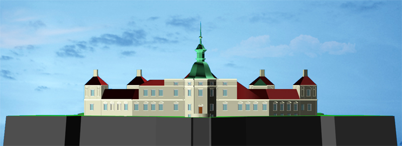 Krzyżtopór Zamek Krzyżtopór - widok od strony bastionu zwanego "wysokim barbakanem"